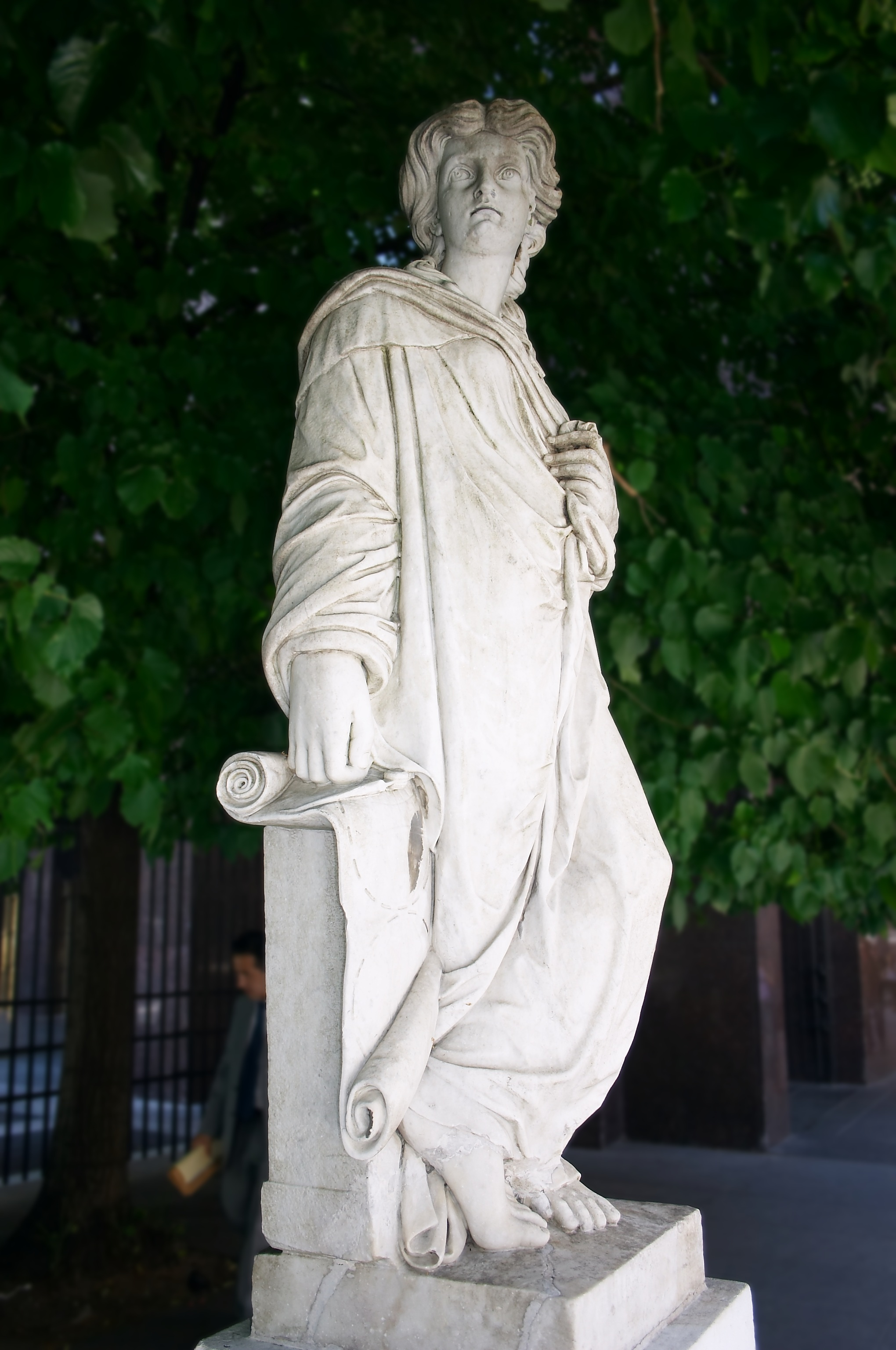 Estatua de la Geografía, cuando estaba aun en la Plazoleta San Francisco, Buenos Aires, Argentina. Esquina de Defensa y Alsina, Barrio de Monserrat.